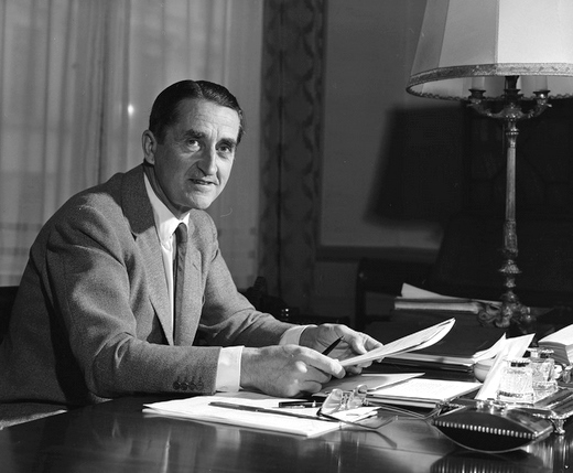 portrett, mann, direktør i Storebrand, sittende ved skrivebord.